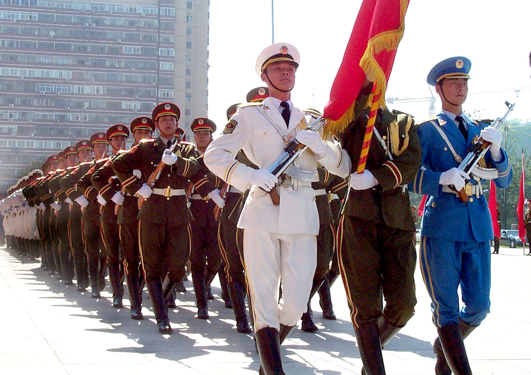 中国人民解放军三军仪仗队 来自en wiki